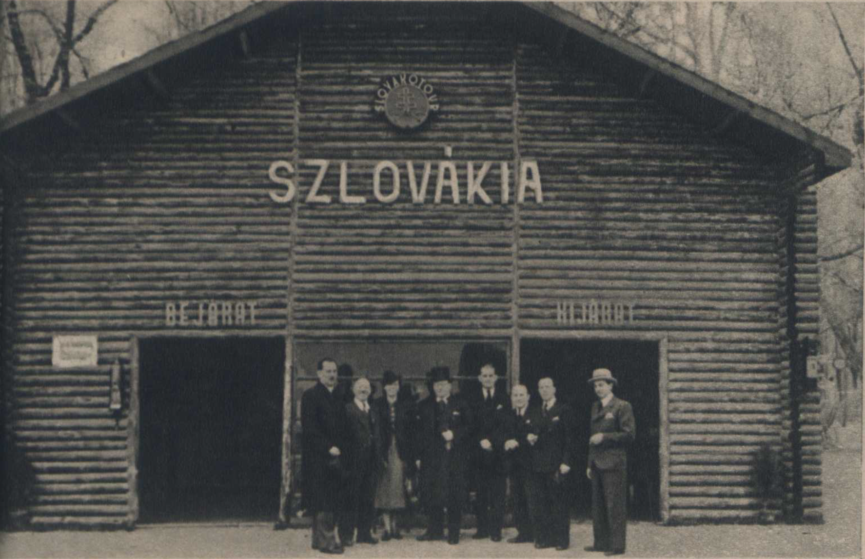 "Slovenský pavilón na medzinárodnom veľtrhu v Budapešti, ktorv vystaval Slovakotour. Pavilón svojou originálnosťou (je vystavaný na spôsob horskej chaty) vzbudil veľký záujem u návitevnfkov veľtrhu."